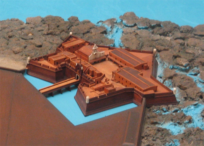 Detalle de la maqueta de Cádiz del siglo XVIII ubicada en el Museo de las Cortes de Cádiz. Se observa el Castillo de Santa Catalina y parte de La Caleta.